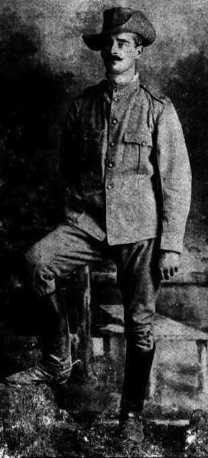 Lieutenant Stanley Spencer Reid, 6WAMI, 1901